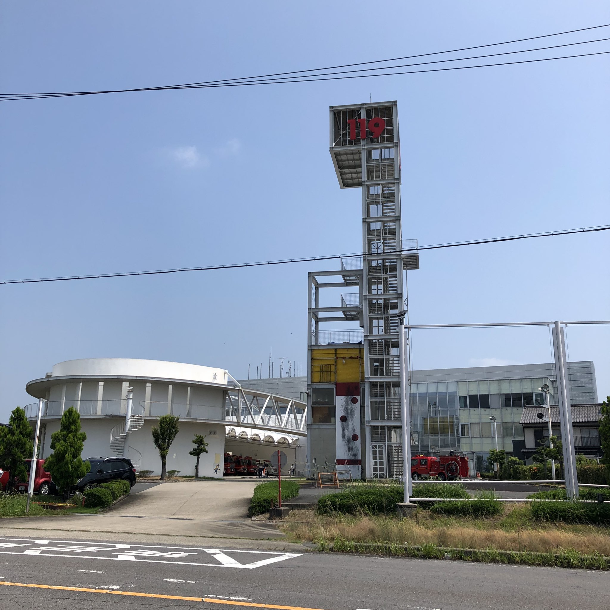 9月9日 13:47 撮影